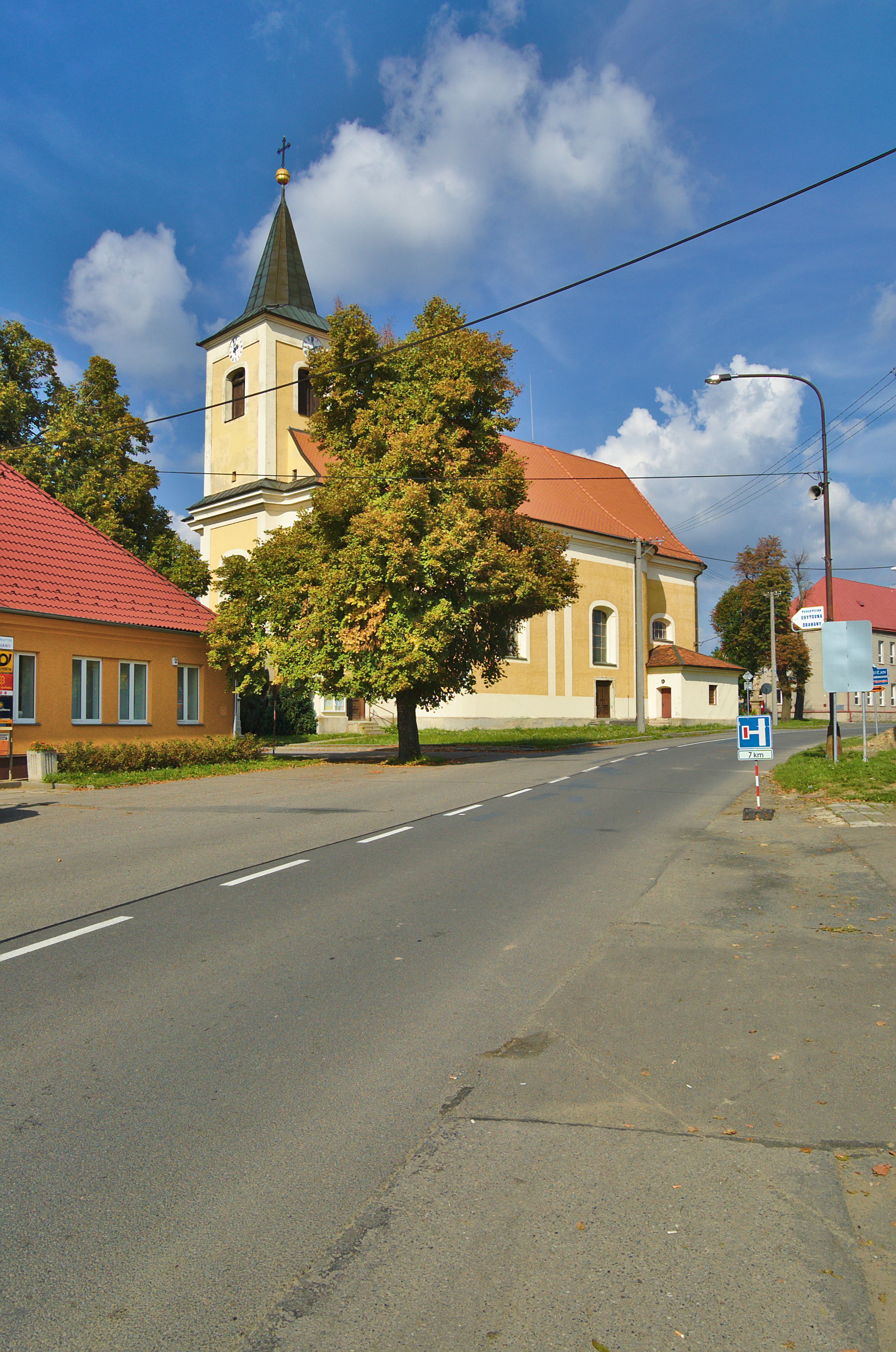 Kostel svatého Jana Křtitele, Drahany, okres Prostějov